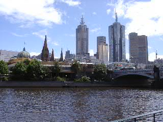 Blick auf die Innenstadt von Melbourne vom Yarra River aus gesehen